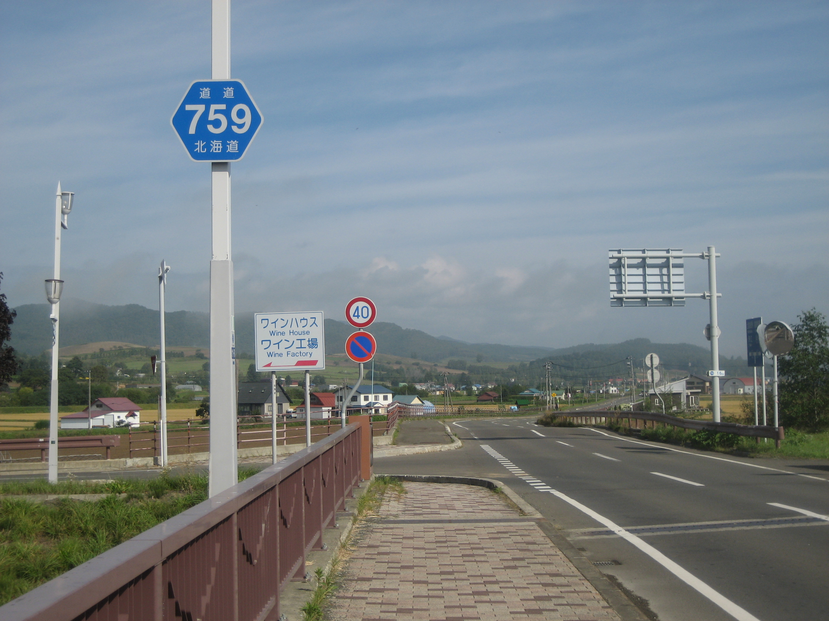 北海道道759号線富良野市シャトー富良野橋付近